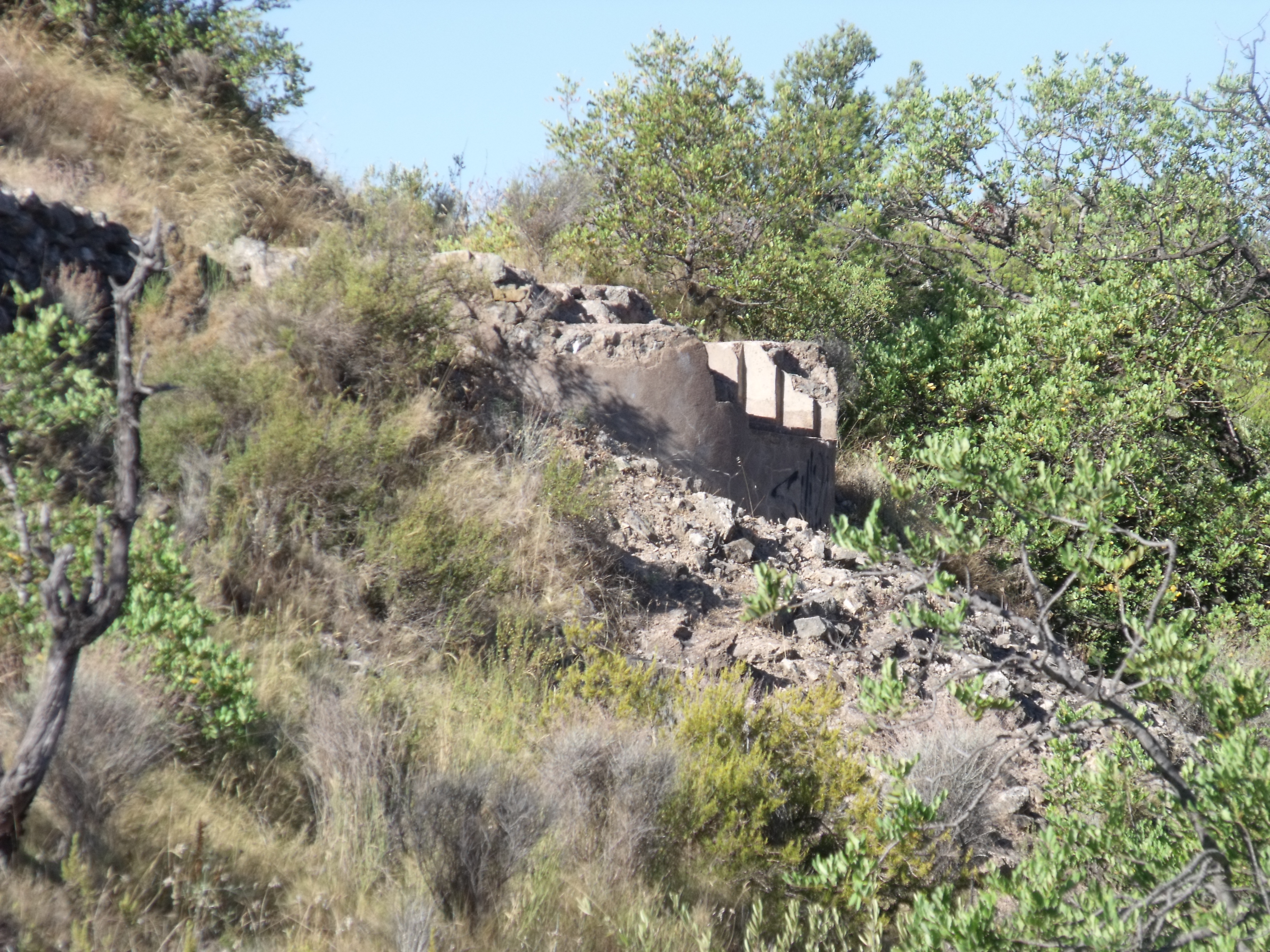 Vall de Uxó